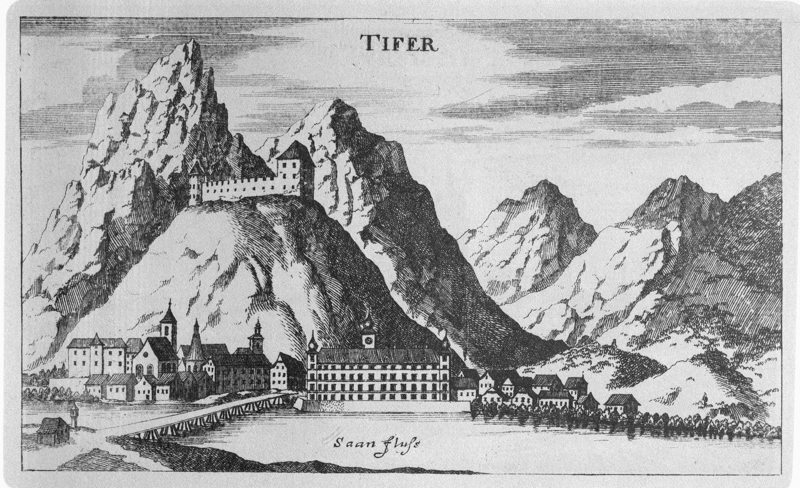 G. M. Vischers Käyserlichen Geographi, Topographia Ducatus Stiriae, Das ist: Eigentliche Delineation / und Abbildung aller Städte / Schlösser / Marcktfleck / Lustgärten / Probsteyen / Stiffter / Clöster und Kirchen / so es sich im Herzogthumb Steyrmarck befinden; Und anjetzo Umb einen billichen Preyß zu finden seynd Bey Johann Bitsch Universitäts Buchhandlern / Auff dem Juden=Platz bey der guldenen Saulen. Graz 1681 Die Nummerierung der Dateien folgt der alphabetischen Reihung der Ortsnamen und entspricht nicht dem Vischer-Register